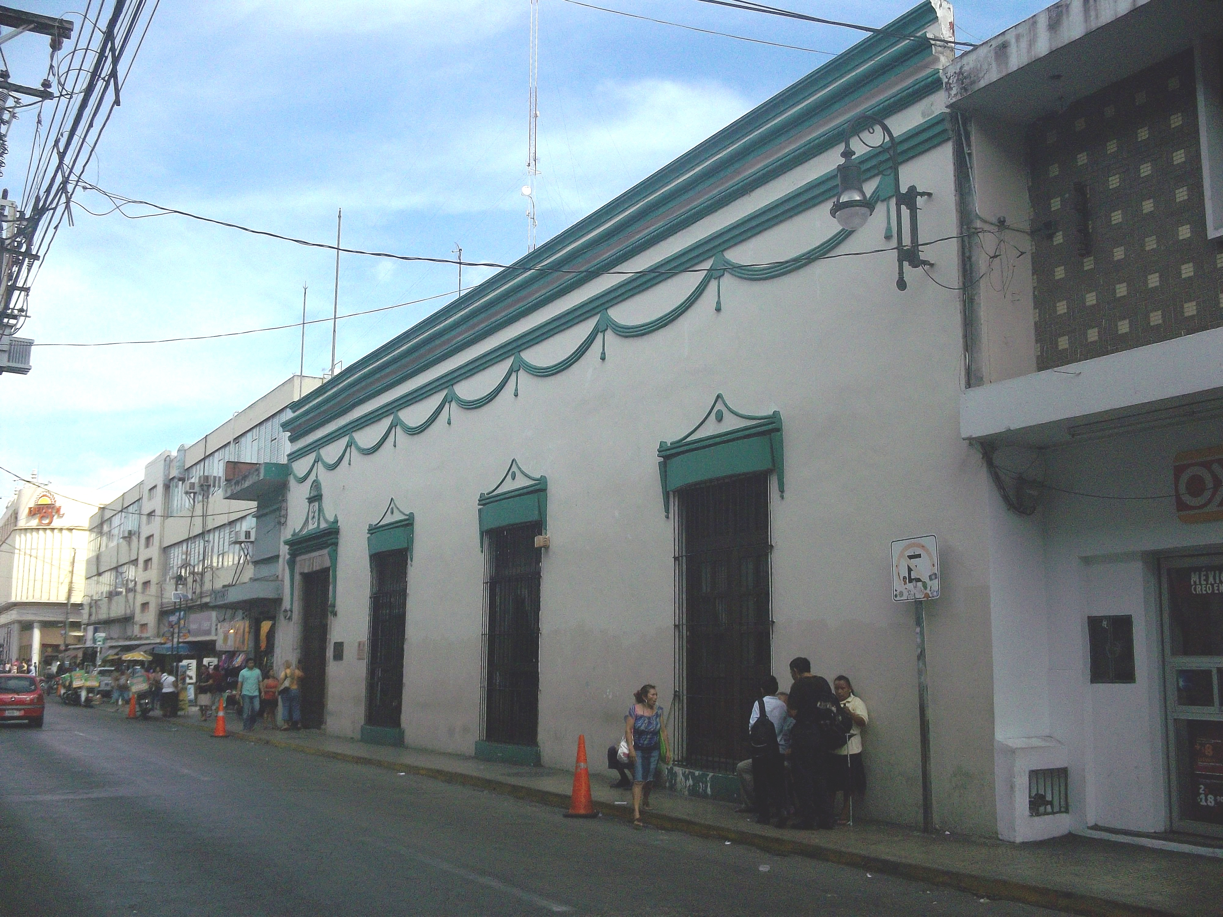 Junta de Agua Potable y Alcantarillado de Yucatán en Mérida, Yucatán.